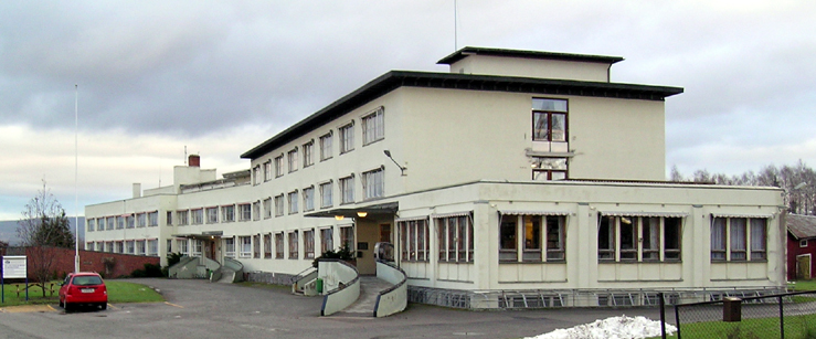 Østlandske vanførehjem, Stange, Norway. Built 1949. Architect: Rolf Prag